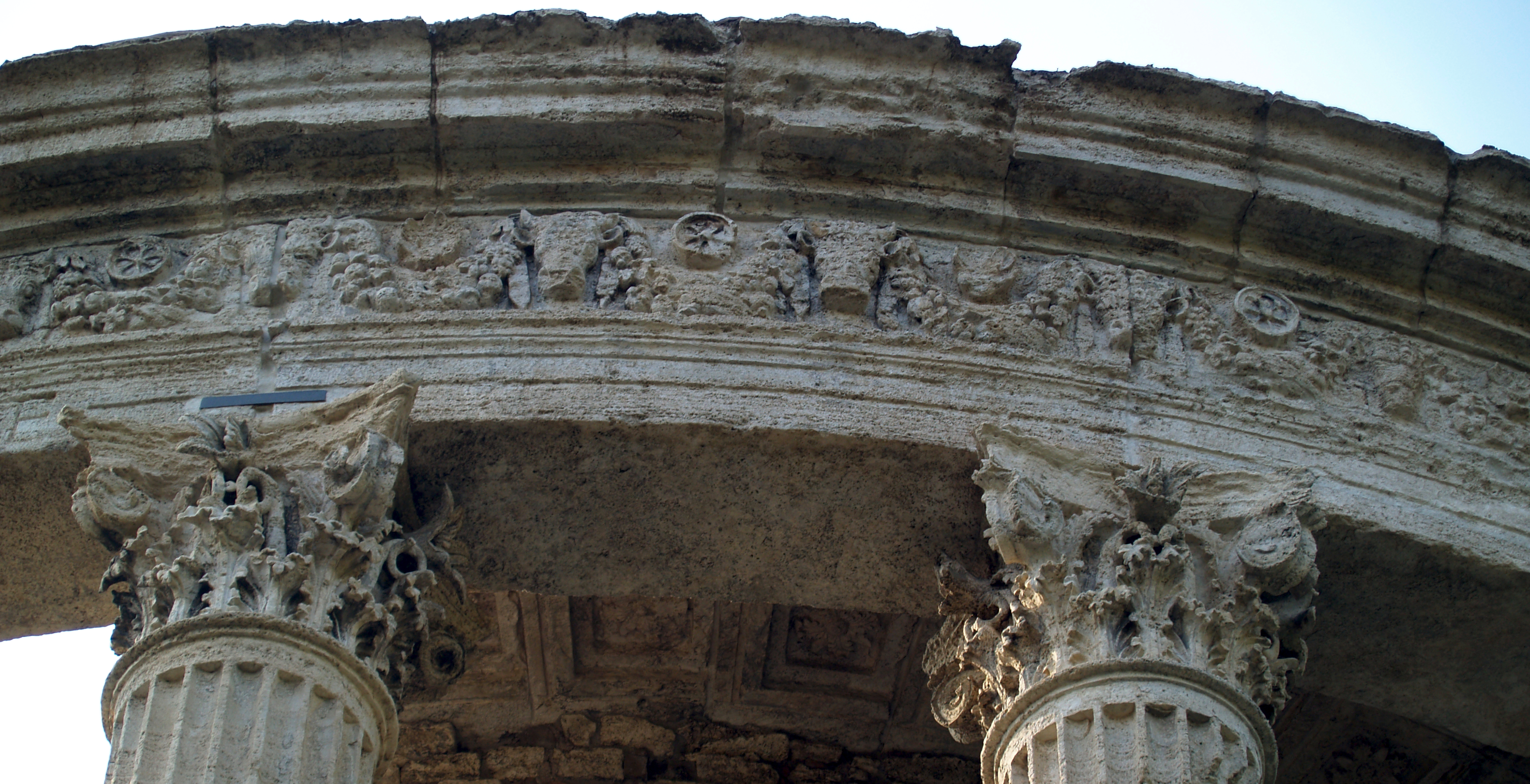 Tivoli. Ruinas del templo de Vesta.